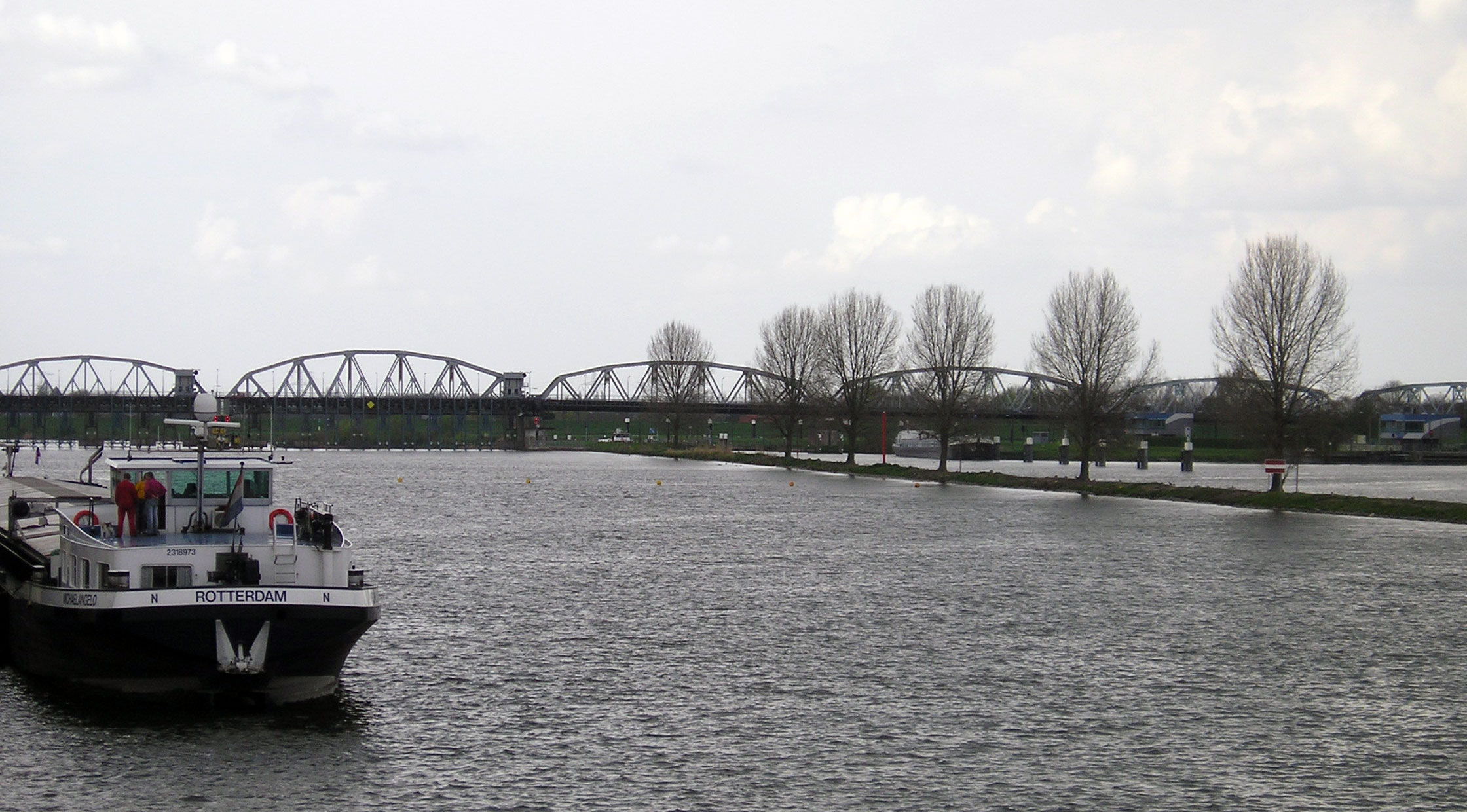 Naast de brug bij de stuw en sluis van Grave het schip met Europanummer 2318973, op dat moment met de naam Michelangelo. Bouwjaar 1989, Bouwwerf Hans Boost in Trier, Duitsland, Afbouwwerf Dolderman in Dordrecht, 1ste. Eigenaar Vof. Bosman & Zn. in Vreeswijk. 1989 Vigila van Vof. Bosman & Zn. in Vreeswijk 1996 Esperanto van P. Leeuwestein in Dordrecht 2000 Michaelangelo van Vof. Eleveld - Bosman in Rotterdam 2006 Silandra van Vof. Silandra (A. van der Graaf) in Dordrecht 2007 Qudajo van Vof. Sanvri Scheepvaartbedrijf (B.H. van Sandijk) in Maasbracht Tonnage: gebouwd met 1697 ton, anno 2008 2147 ton Lengte: gebouwd met 8447 cm, anno 2008 10947 cm Breedte: 950 cm Diepgang: 318 cm, anno 2008 305 cm Voortstuwing: Caterpillar 1250 pk